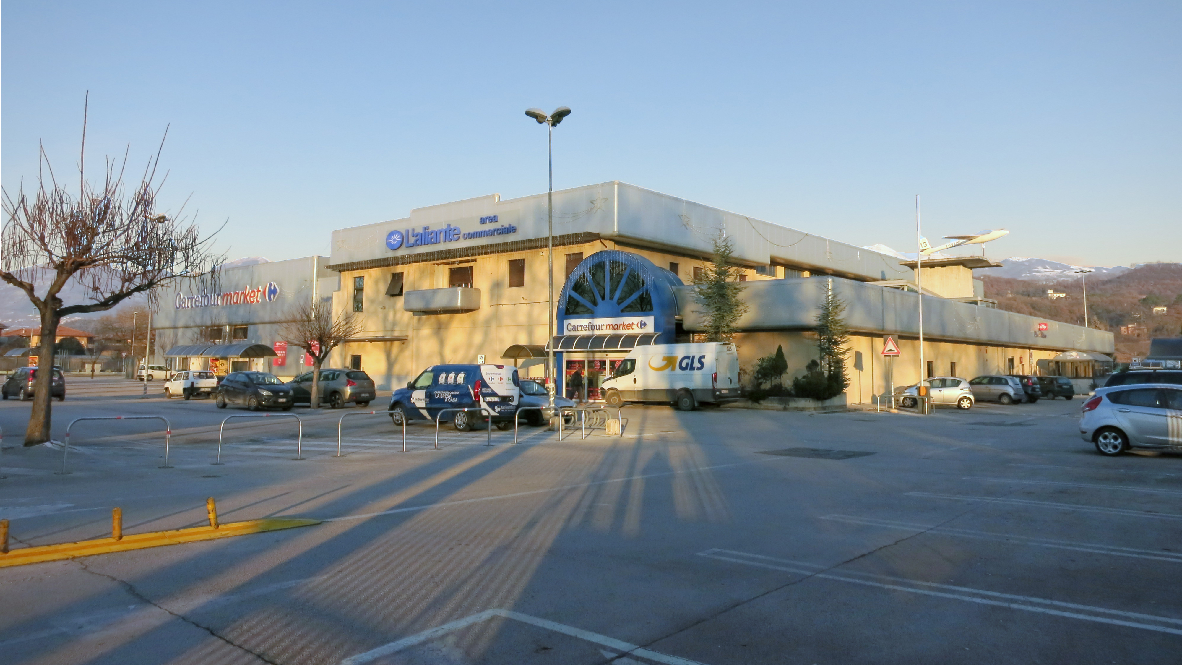 Il centro commerciale L'Aliante di Rieti (Lazio), sede del supermercato Carrefour (ex GS), il cui edificio costituiva in passato lo stabilimento produttivo della ORLA (Officine Reatine Lavorazioni Aeronautiche).